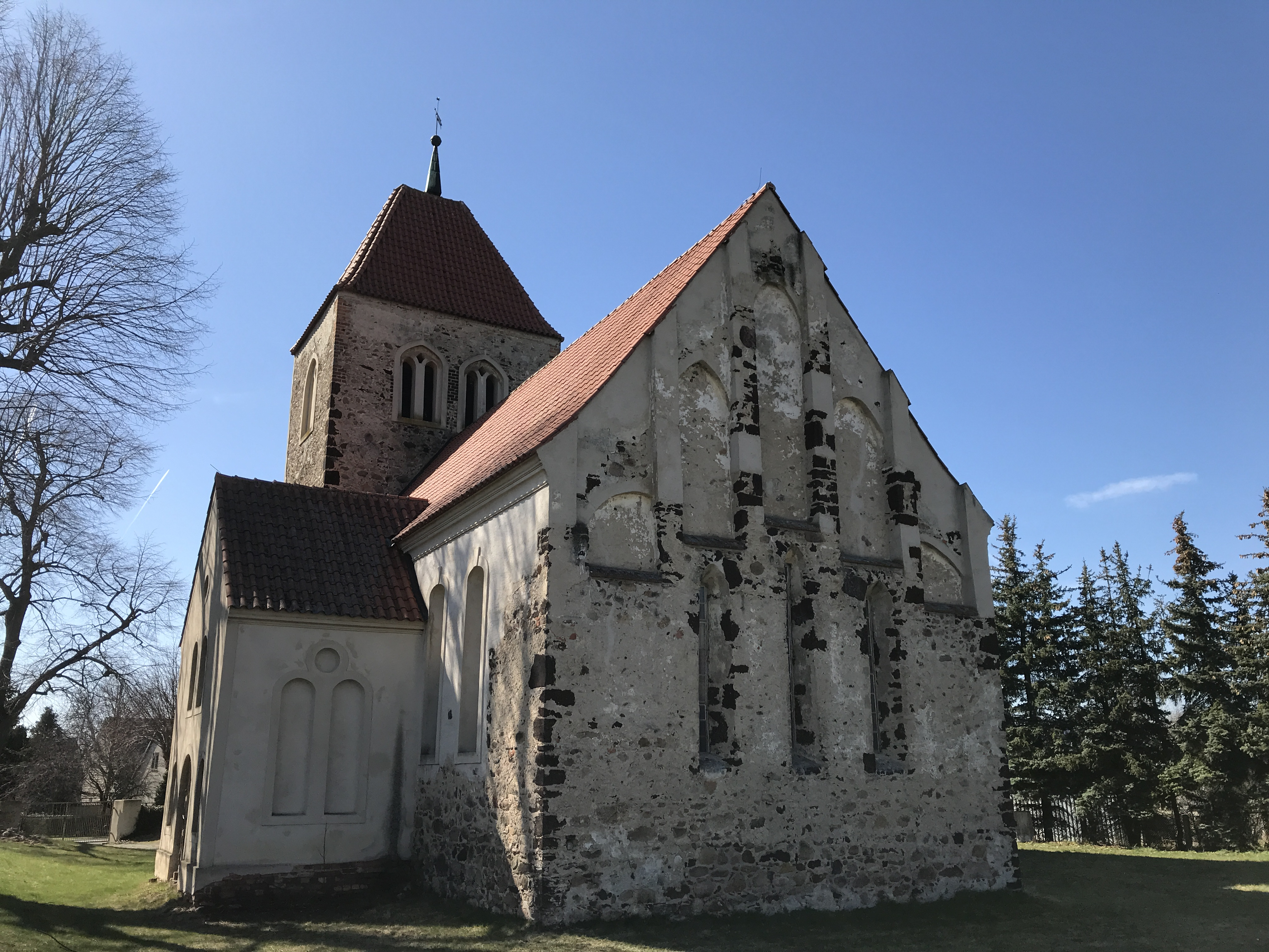 Die Dorfkirche in Beesdau, Gemeinde Heideblick im Landkreis Dahme-Spreewald entstand vermutlich im 14. Jahrhundert.